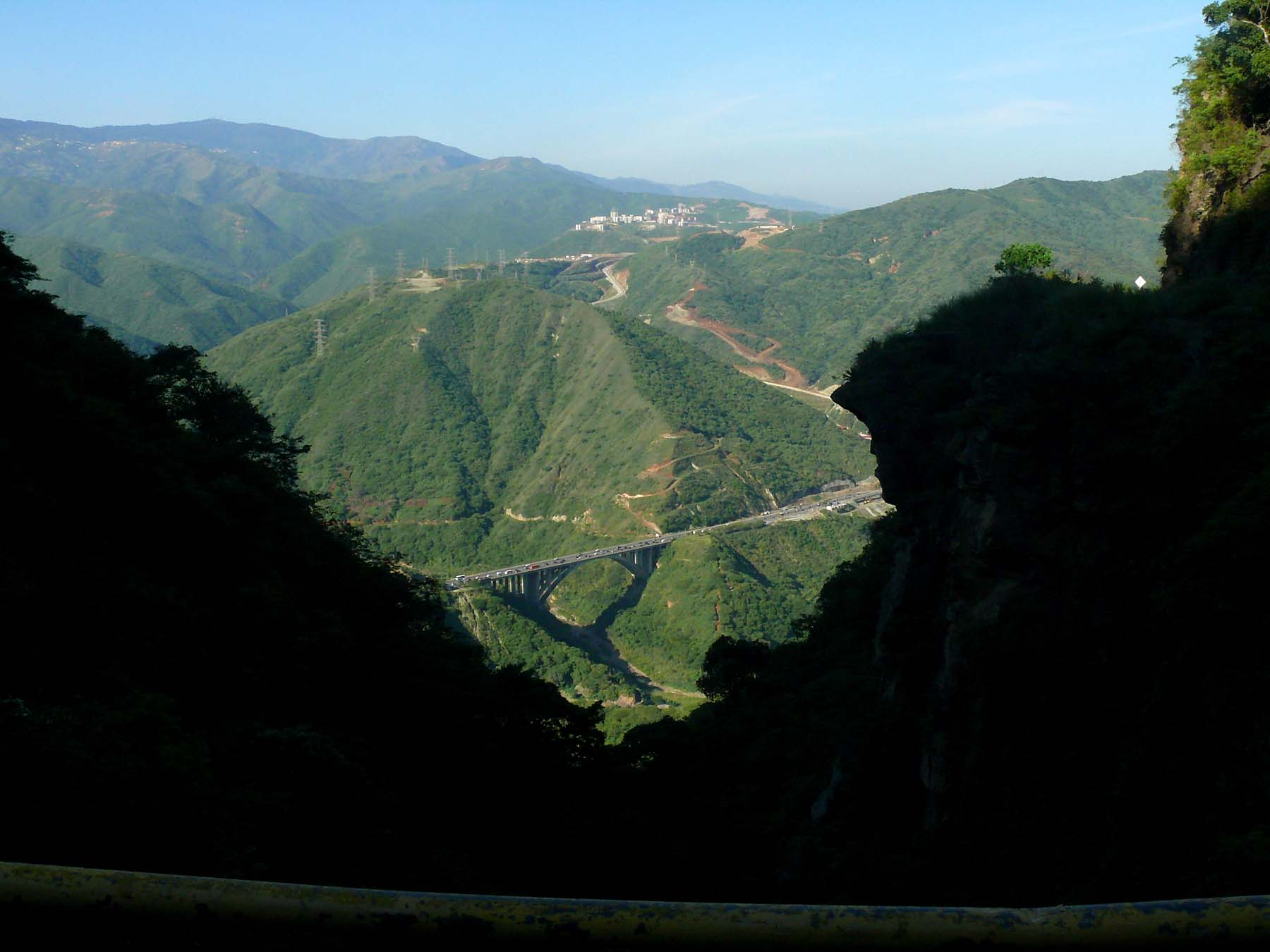 Vista de la autopista Caracas-La Guaira desde la carretera vieja